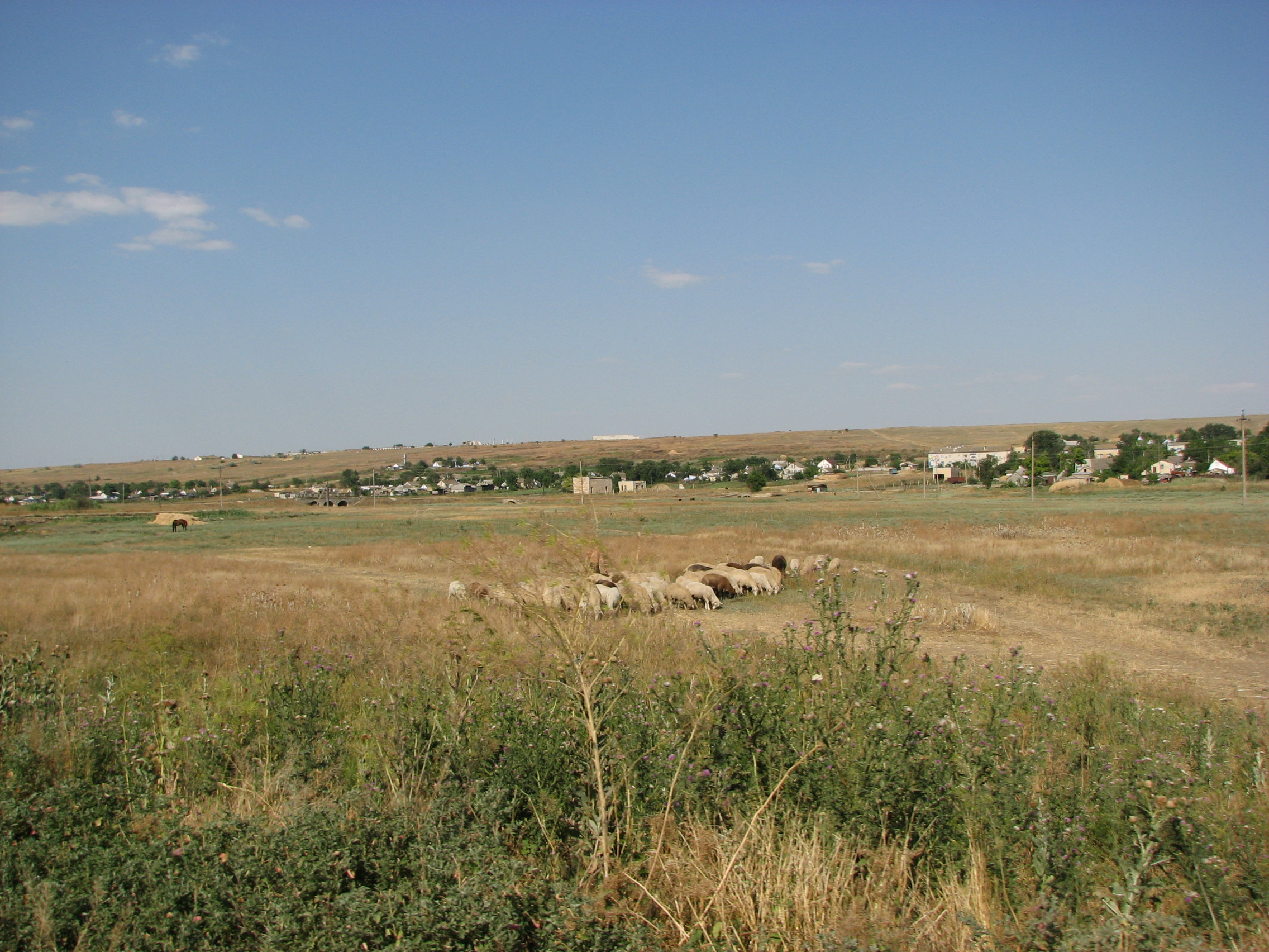 Село Благоево Одесская область 2008 г.